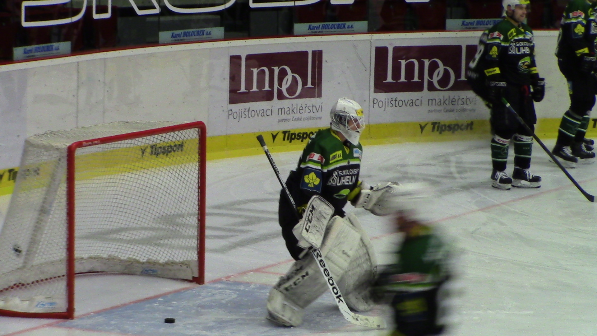 závorka